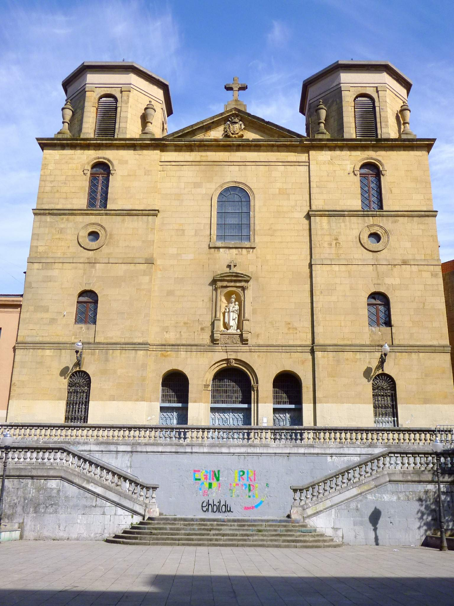 Bilbao - barrio de Santuxu, Iglesia del Carmelo de Begoña